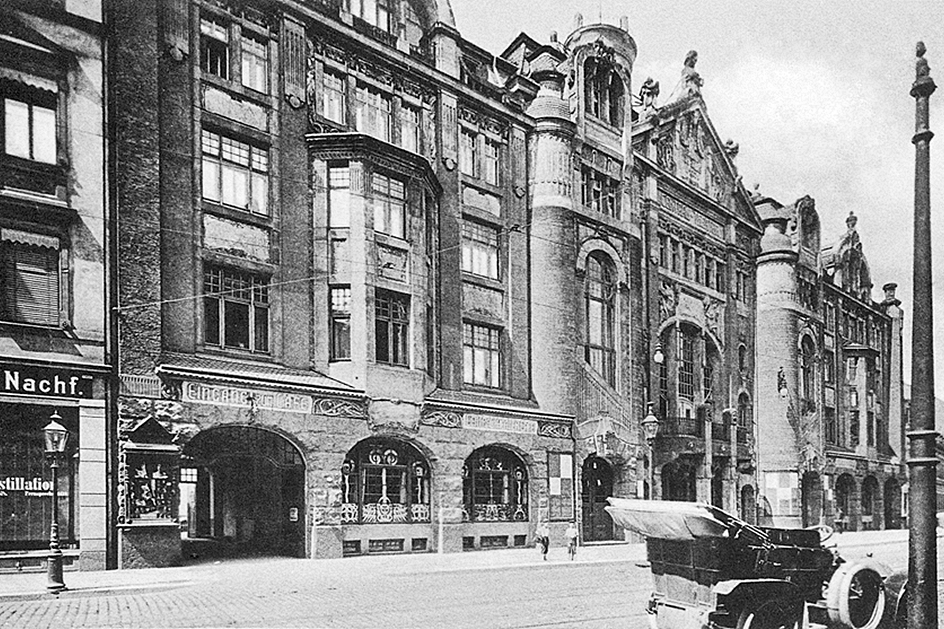 Das im Zweiten Weltkrieg zerstörte Central-Theater in Chemnitz um 1915